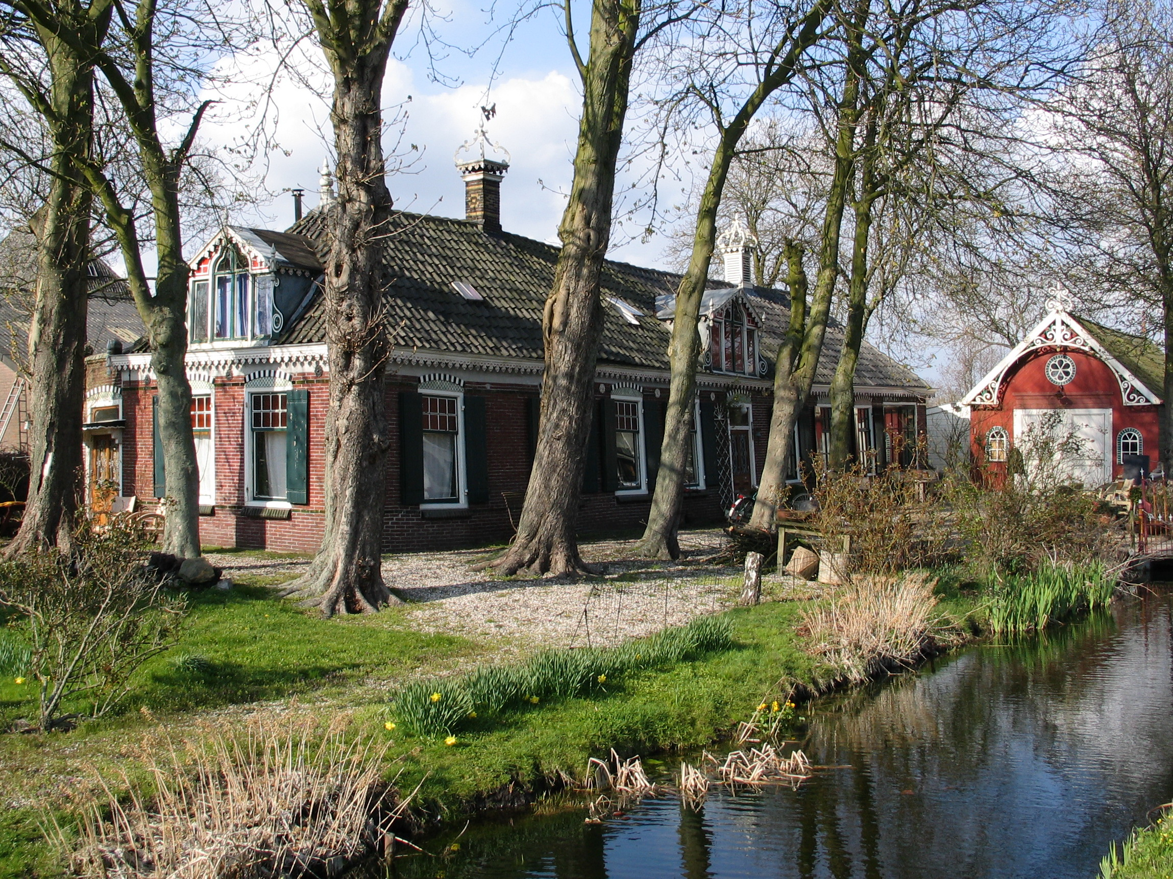 Vinkeveen, Baambrugse Zuwe 1-3 --- Dit fraaie pand werd rond 1870 gebouwd en bestond uit een woonhuis, smederij en wagenmakerij. Opvallend is de rijke versiering.